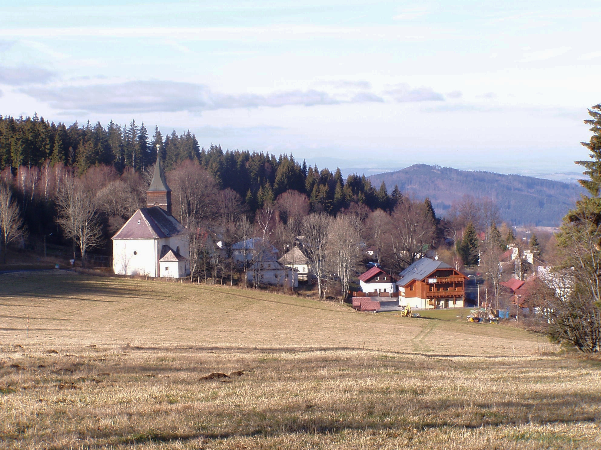 Hojsova Stráž (jaro2008)